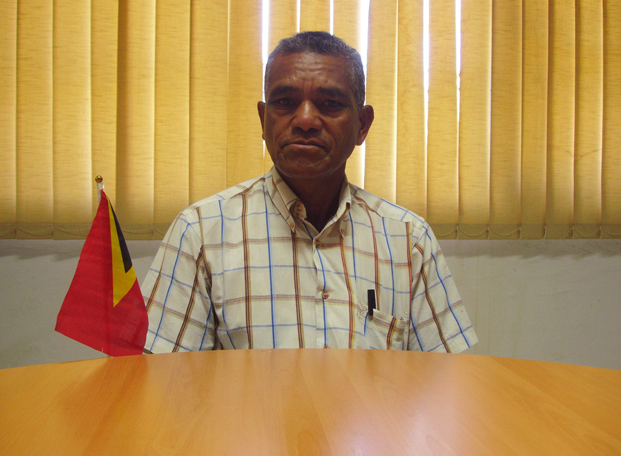 Julio Tomás da Silva, Administrator des Subdistrikts Venilale